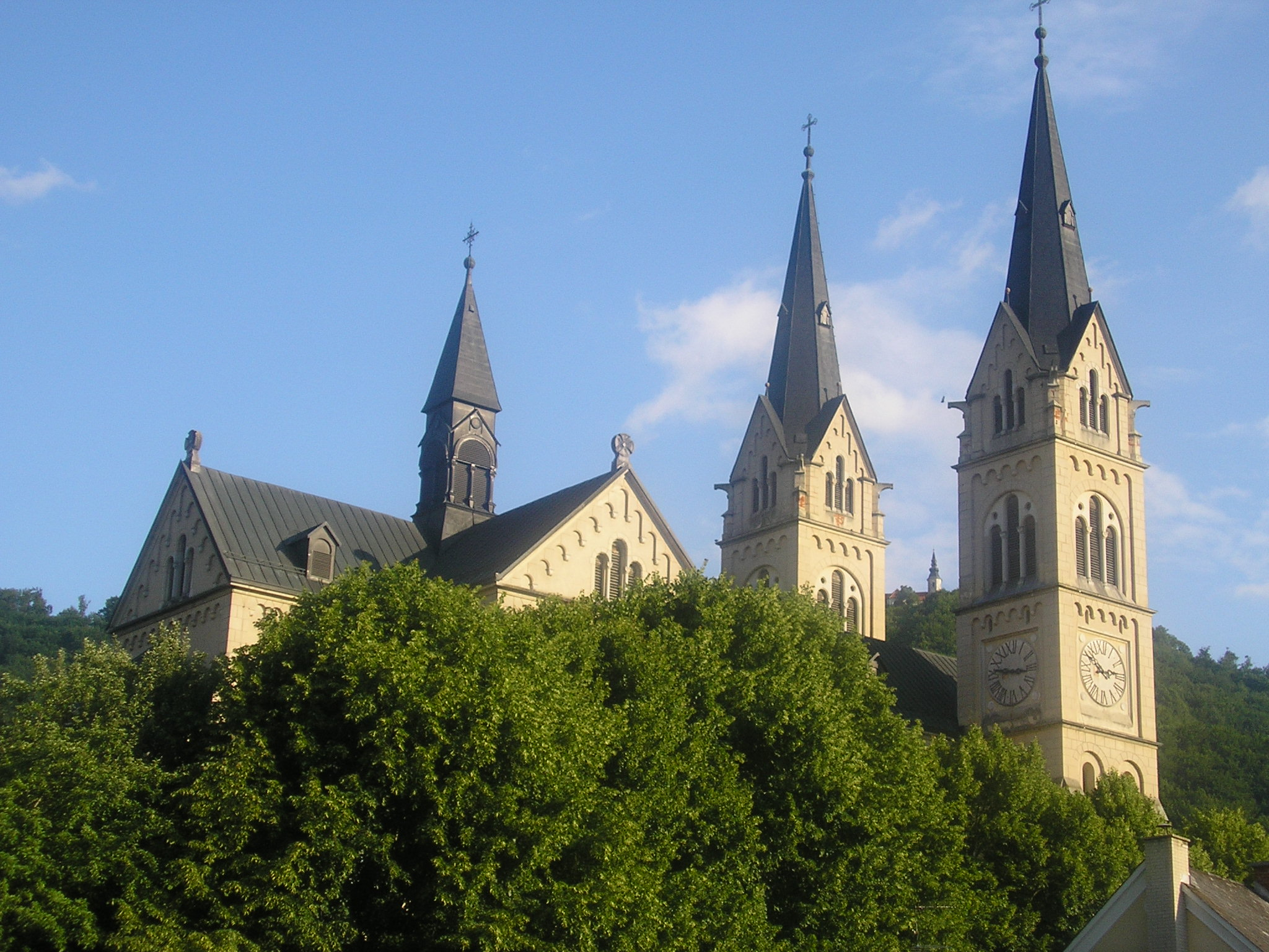 Bazilika Lurške Marije v Brestanici